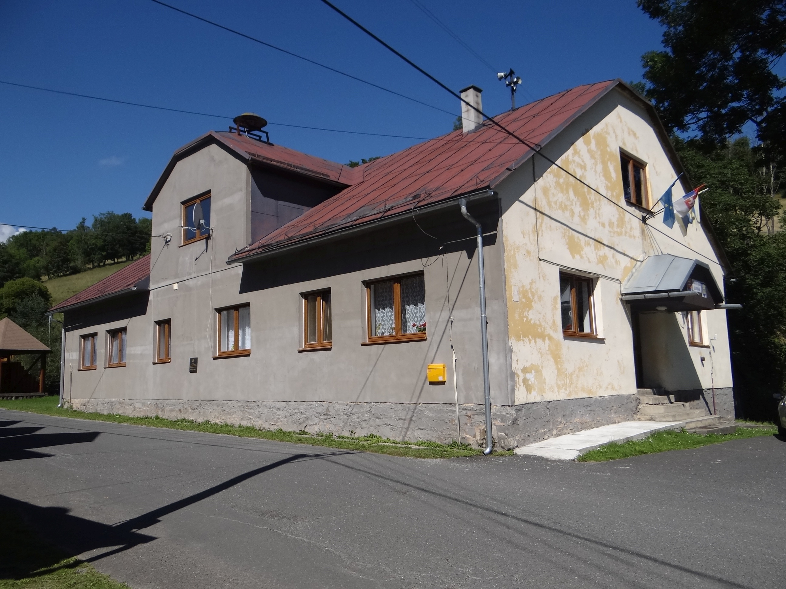 Jezersko